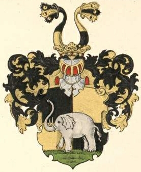 Helffreichi suguvõsa aadlivapp